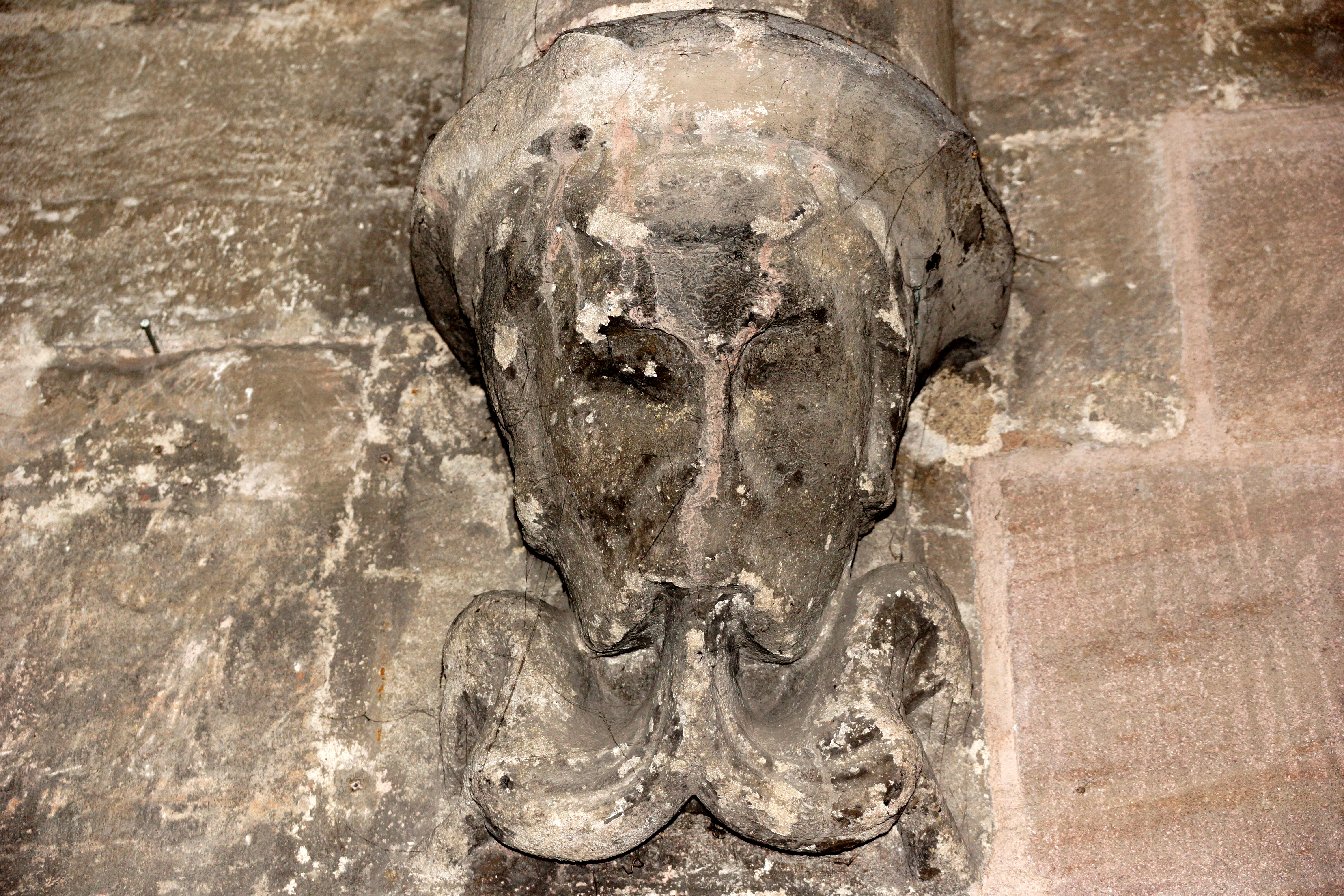 Die Sebaldus-Kirche in Nürnberg